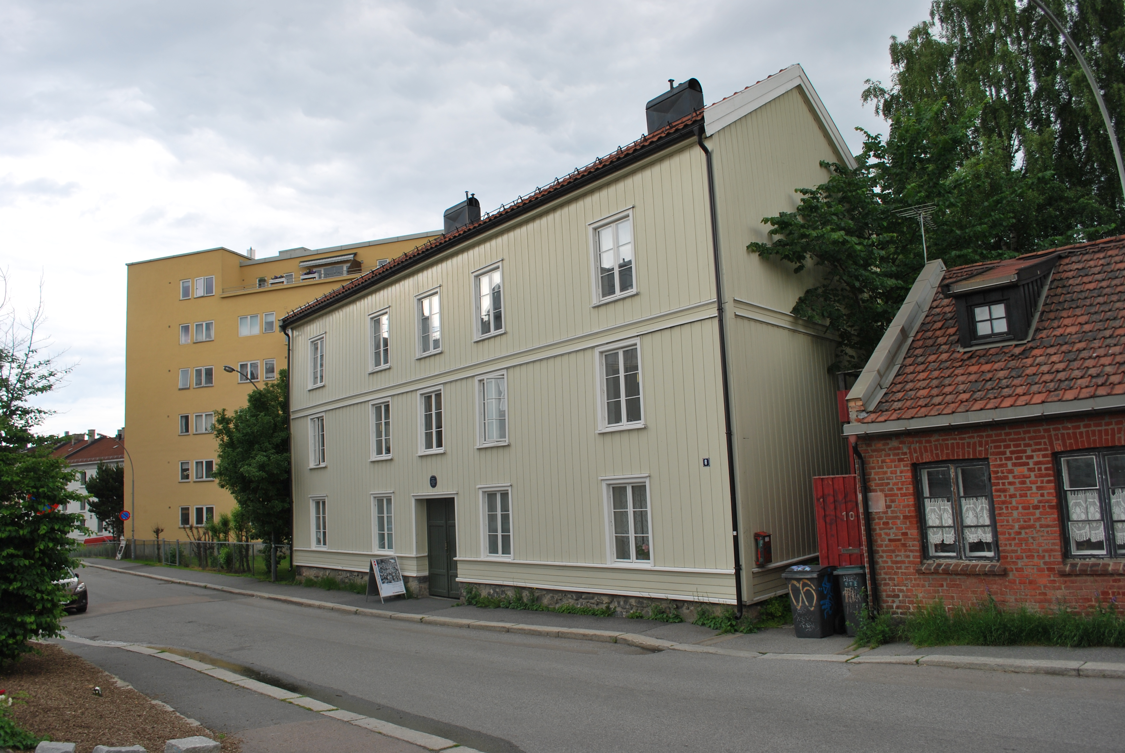 Sagveien 8, Sagene, Oslo, eiet av Selskabet for Oslo Byes Vel. Oslo Museum har museumsleilighet her knyttet til Arbeidermuseet i Sagv. 28